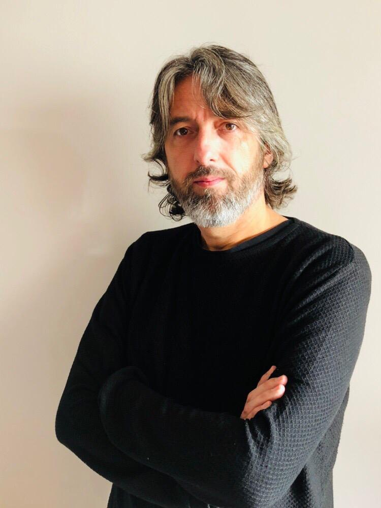 Economista y académico español, actual director ejecutivo del Centro Estratégico Latinoamericano de Geopolítica CELAG.